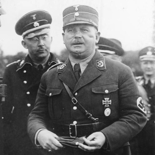 Röhm, Ernst: SA-Stabschef, 1934 erschossen, Deutschland (GND 118745700) Himmler, Heinrich: Reichsführer der SS, Deutschland (GND 11855123X)